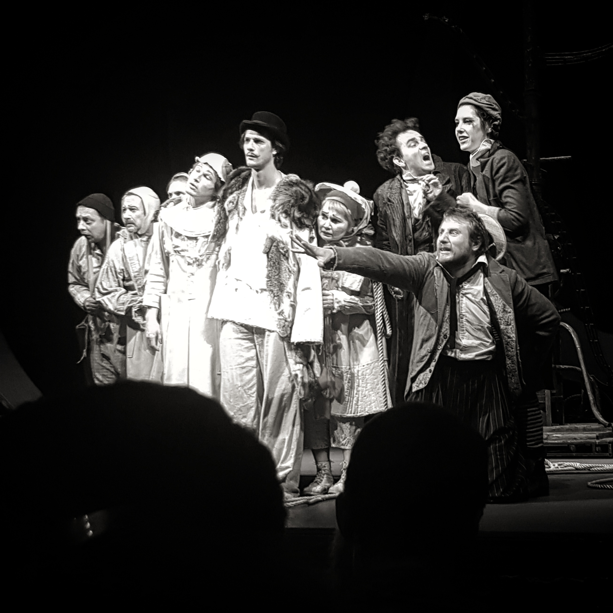 Спектакль "Гиганты горы" по пьесе Луиджи Пиранделло